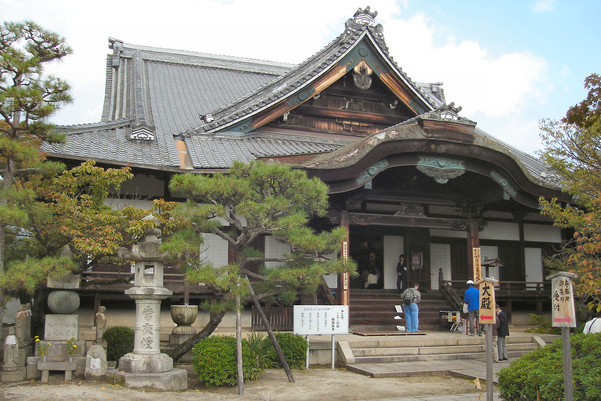 Shojyokein Daiden kyoto Japan